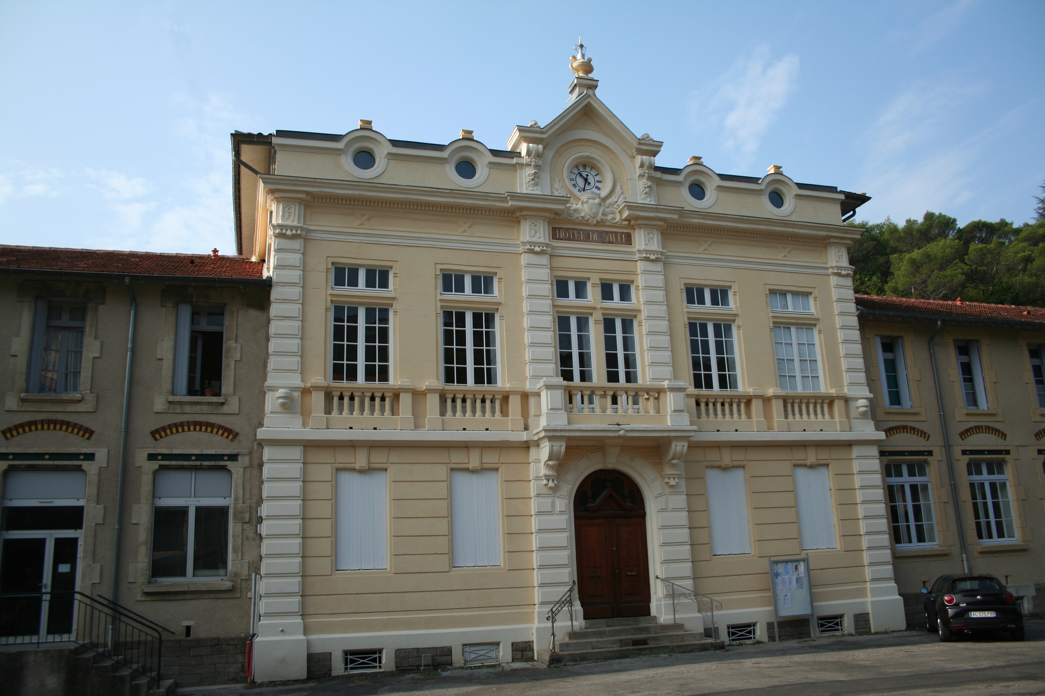 Graissessac (Hérault) - mairie.